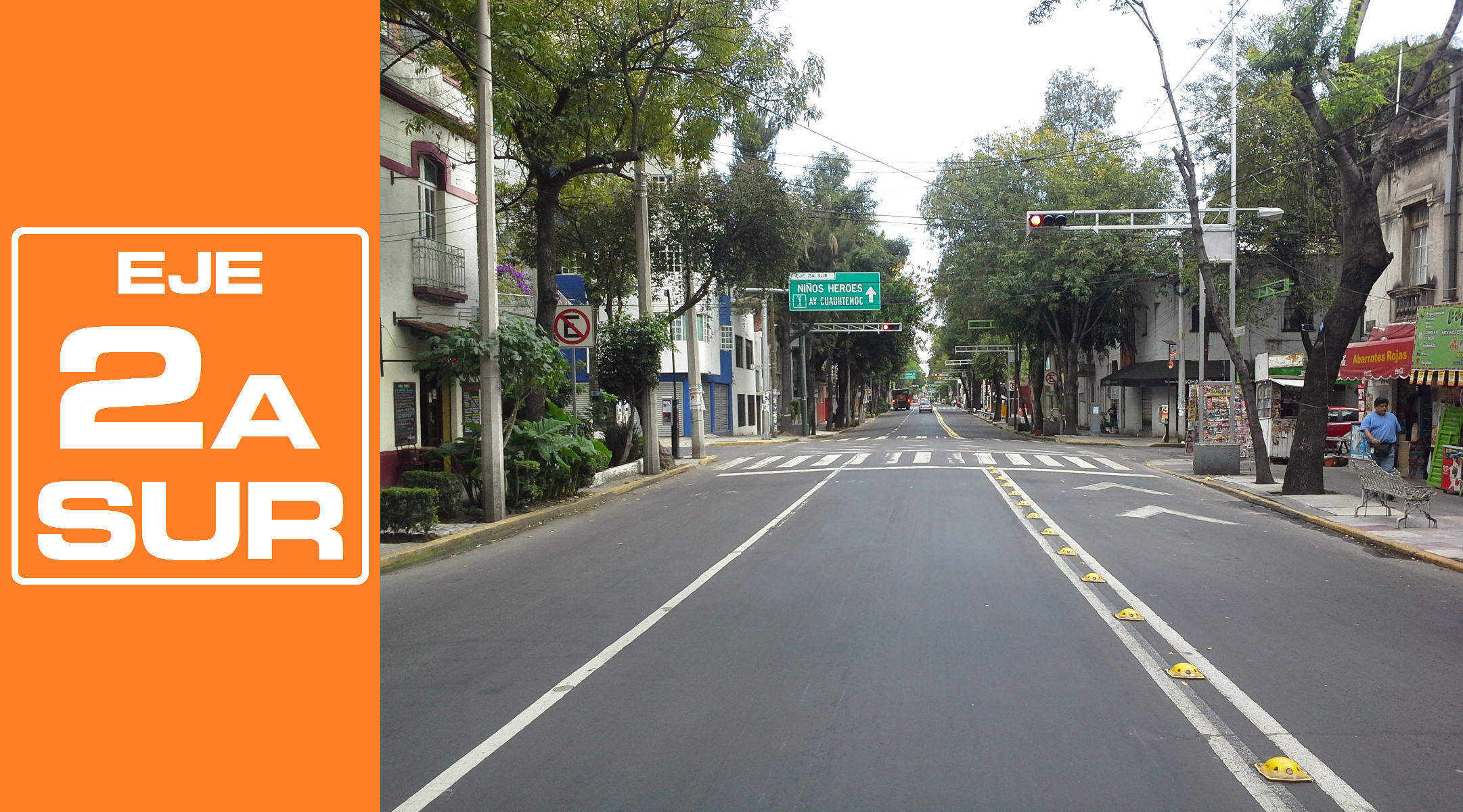 Rediseñado original de la señalética de los Ejes viales de la Ciudad de México por José García (Wiki ID: narumiyama)